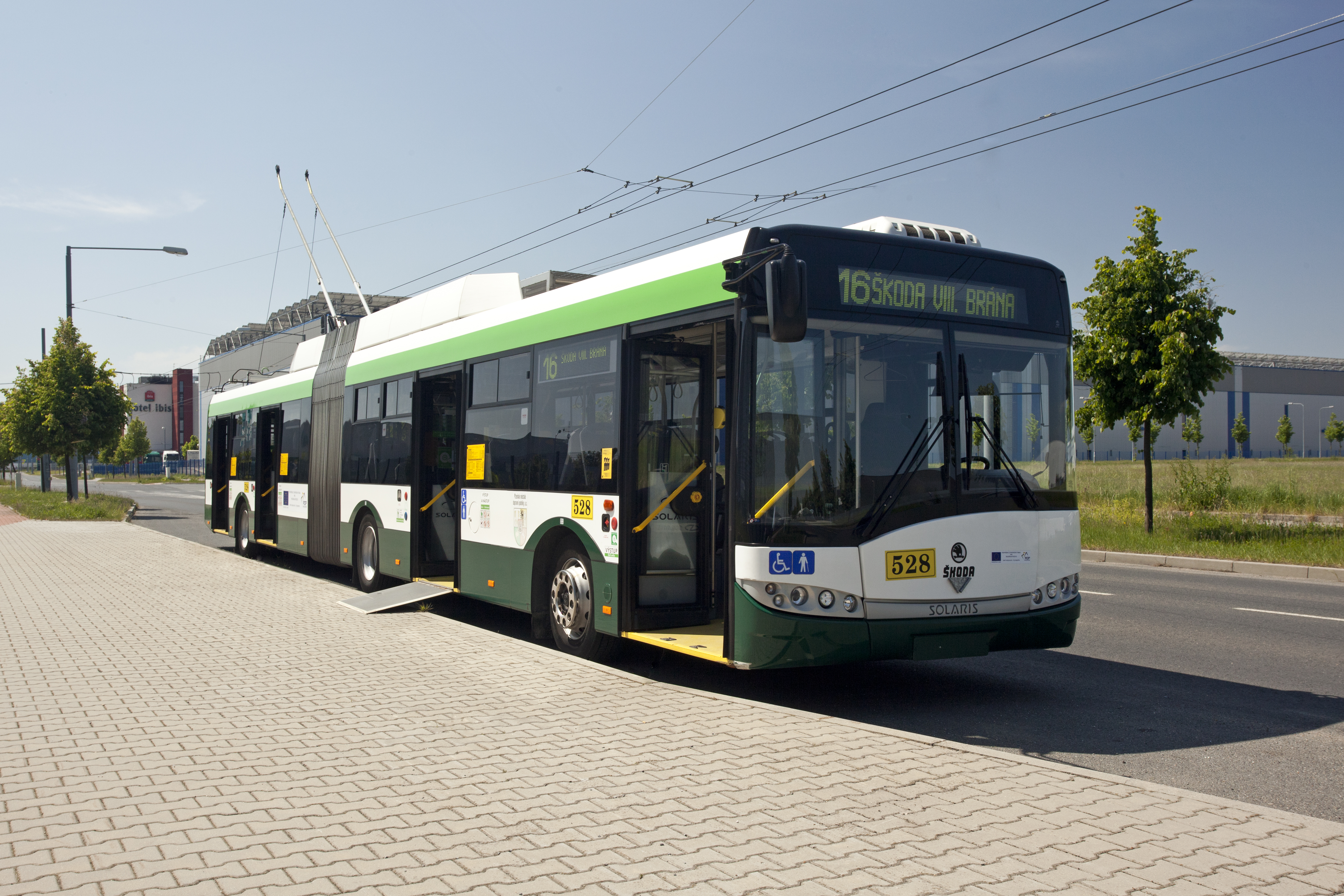 Kloubový trolejbus 27Tr